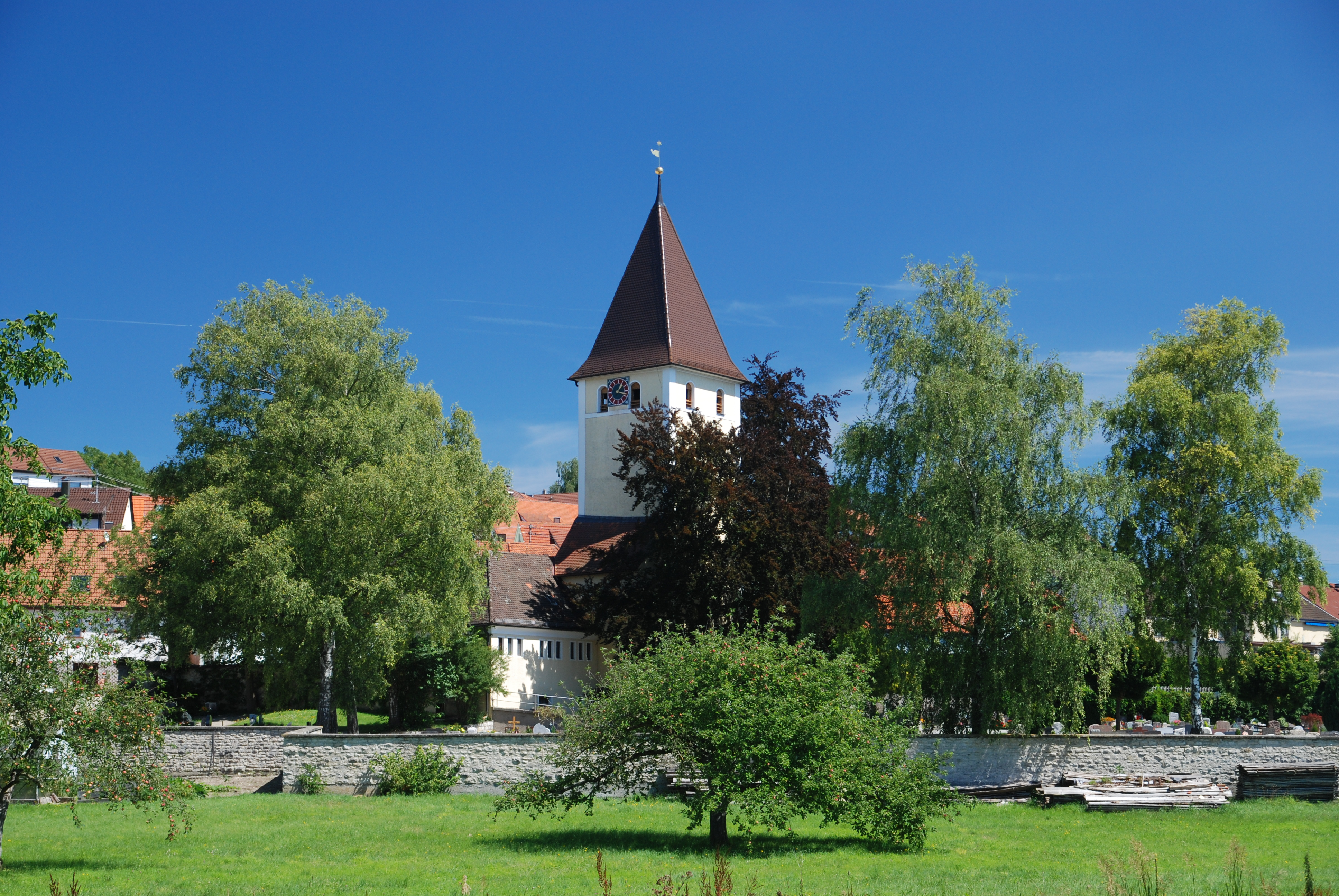 Kirche in Herbrechtingen/Brenz